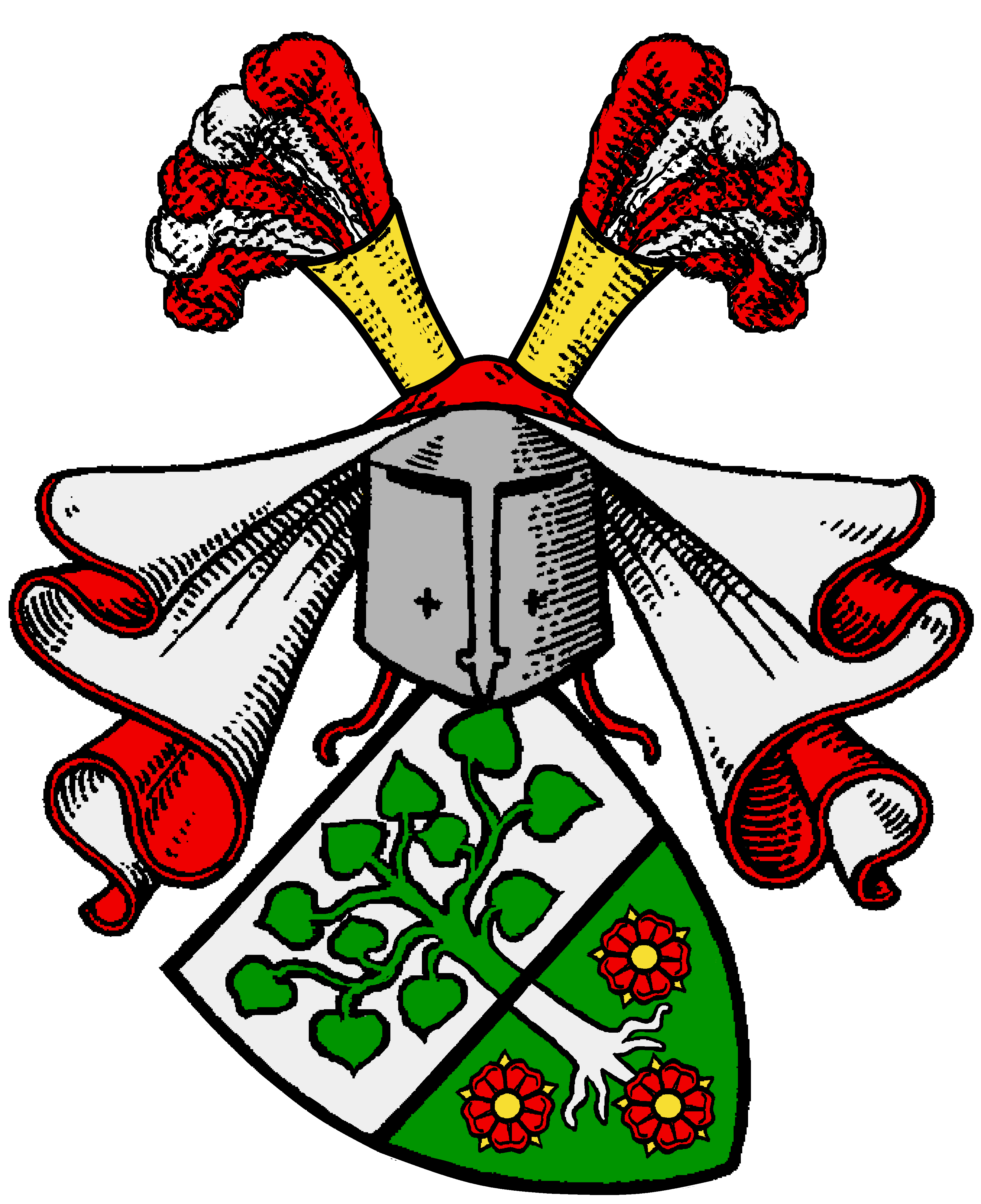 Wappen der von Lindenau, eines alten aus Meißen stammenden Adelsgeschlechts